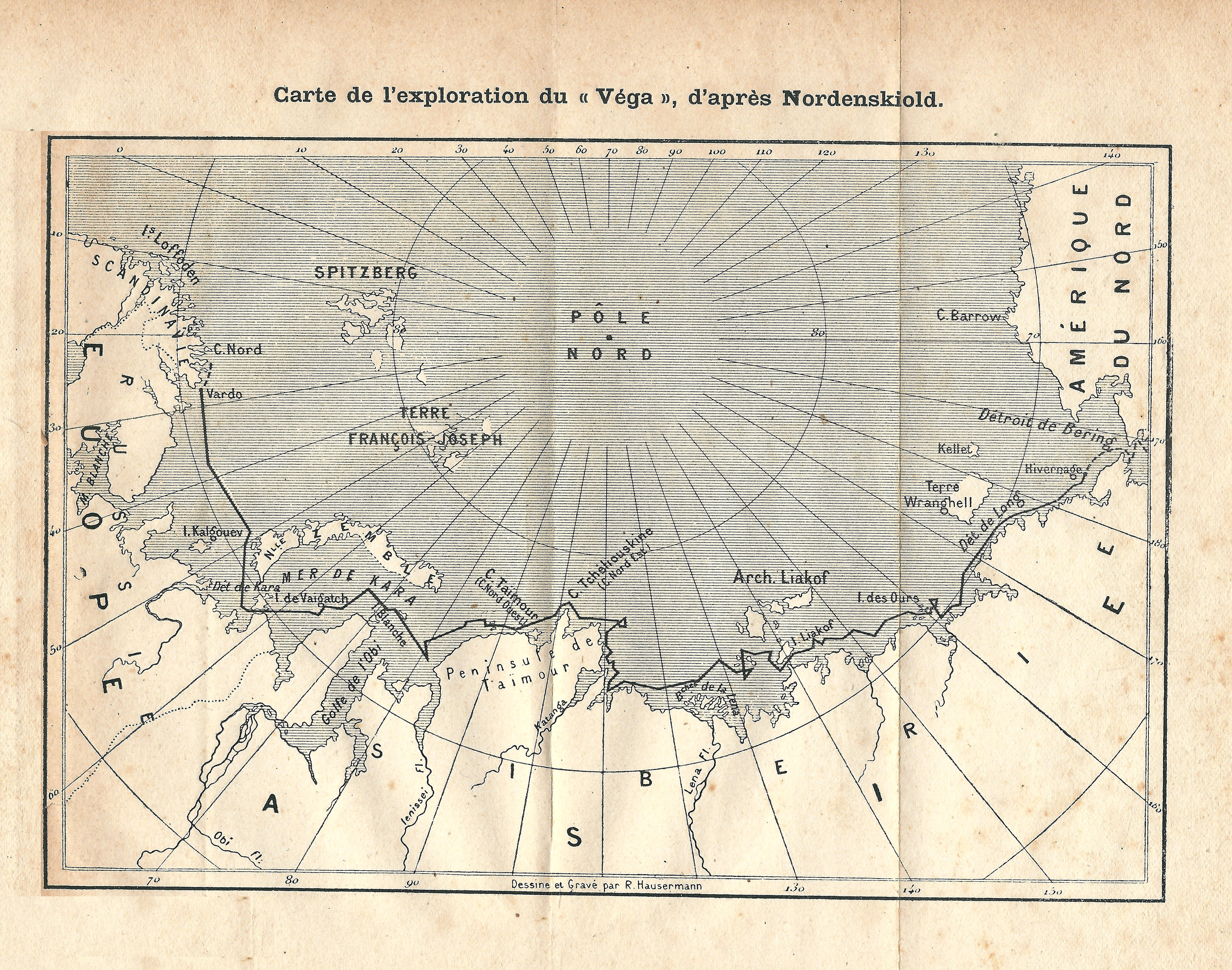 Carte dressée par A. E. Nordenskiöld de sa découverte du passage du Nord-Est du Pôle Nord —1878-1879—